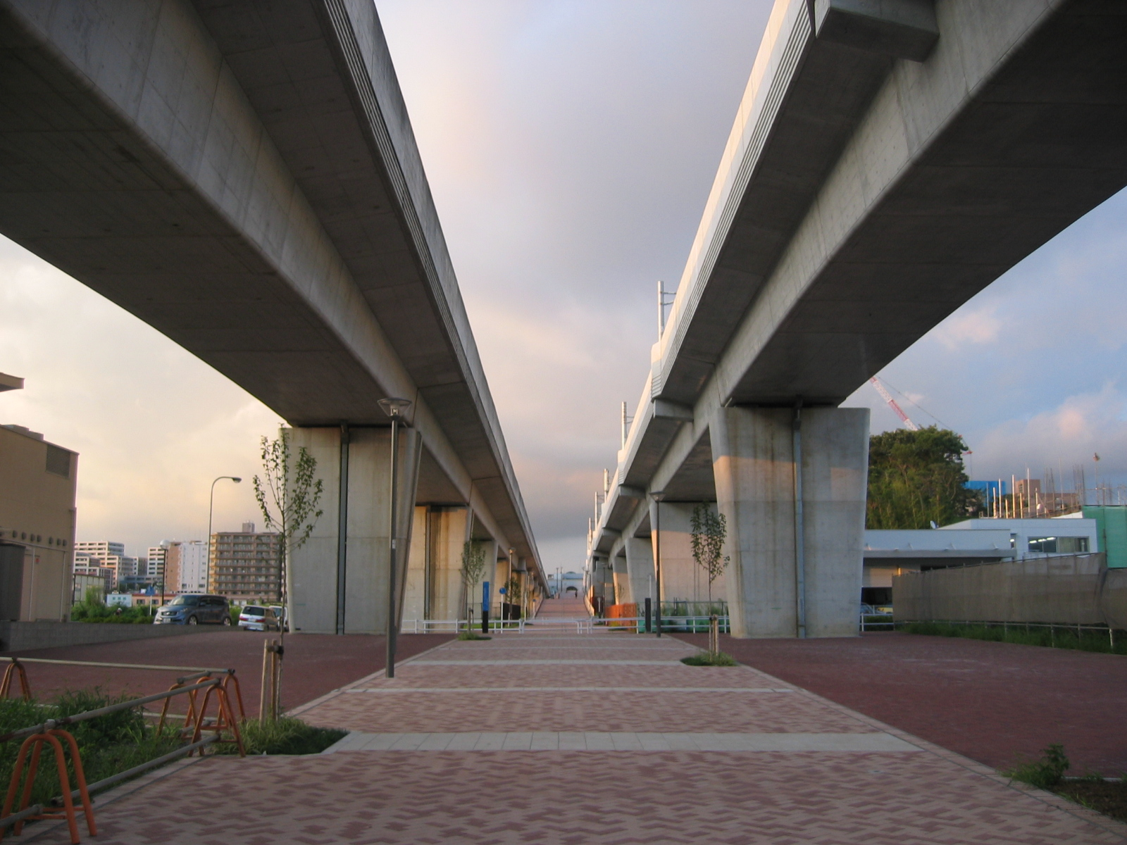 横浜市営地下鉄ブルーラインとグリーンラインの並走区間